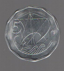 5 миллей